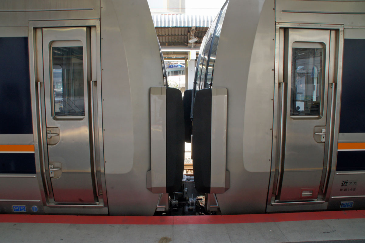 JR西日本207系0番台 先頭車間転落防止幌